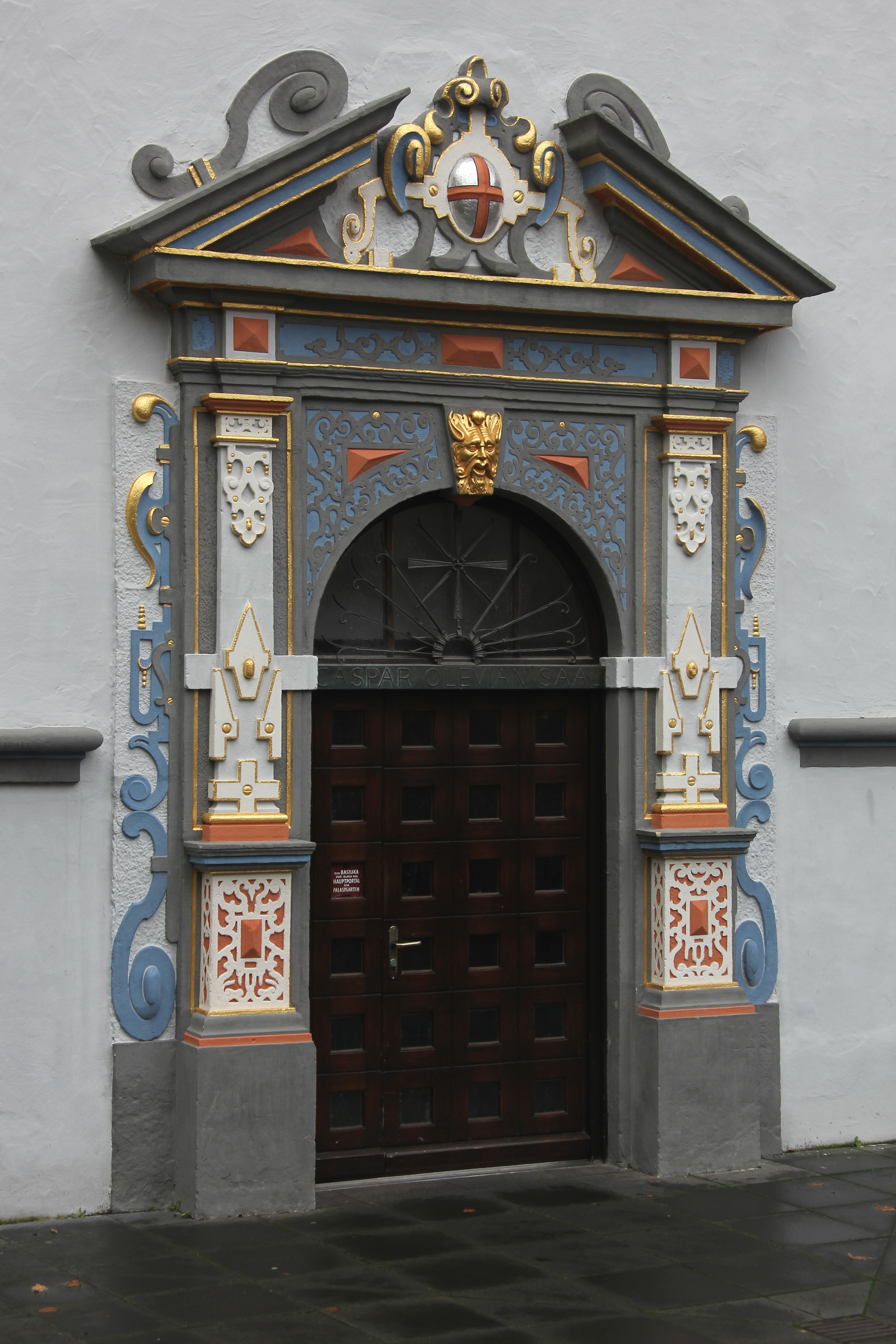 Portal zum Nordflügel des Kurfürstlichen Palais in Trier